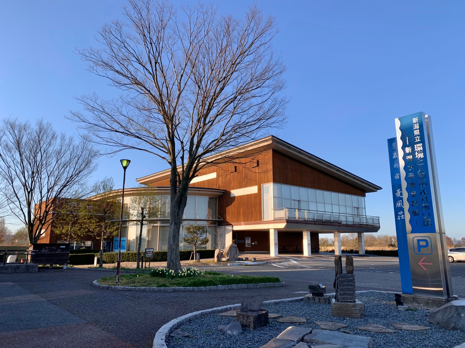 新潟県立環境と人間のふれあい館（2020年4月）